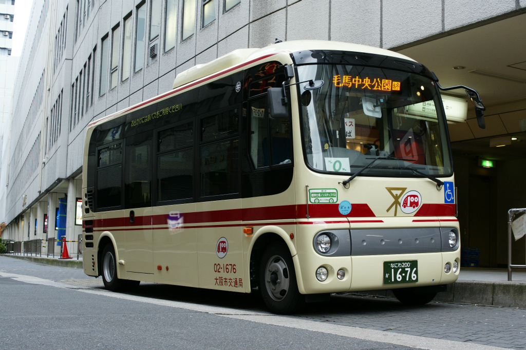 日野・ポンチョ仕様の赤バス車両です。投稿者が撮影。